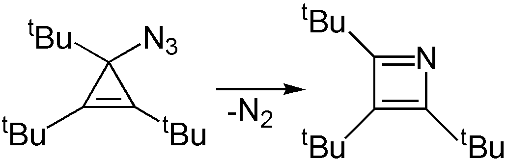 Srtuktur von Tri-tBu-azet